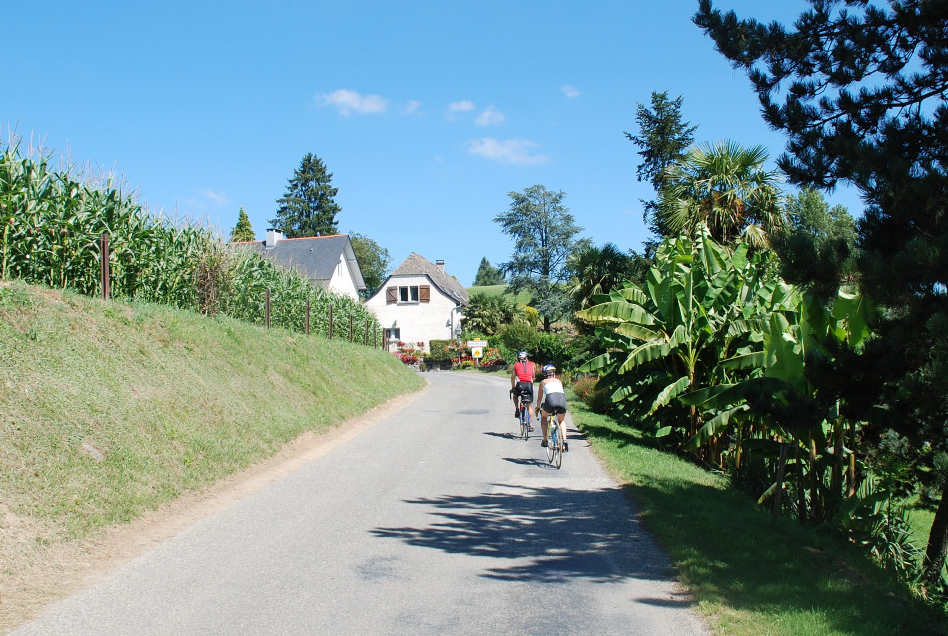 Entrée du village de Bourréac en venant de Lézignan. Arrivée de deux cyclistes qui ont monté la côte.